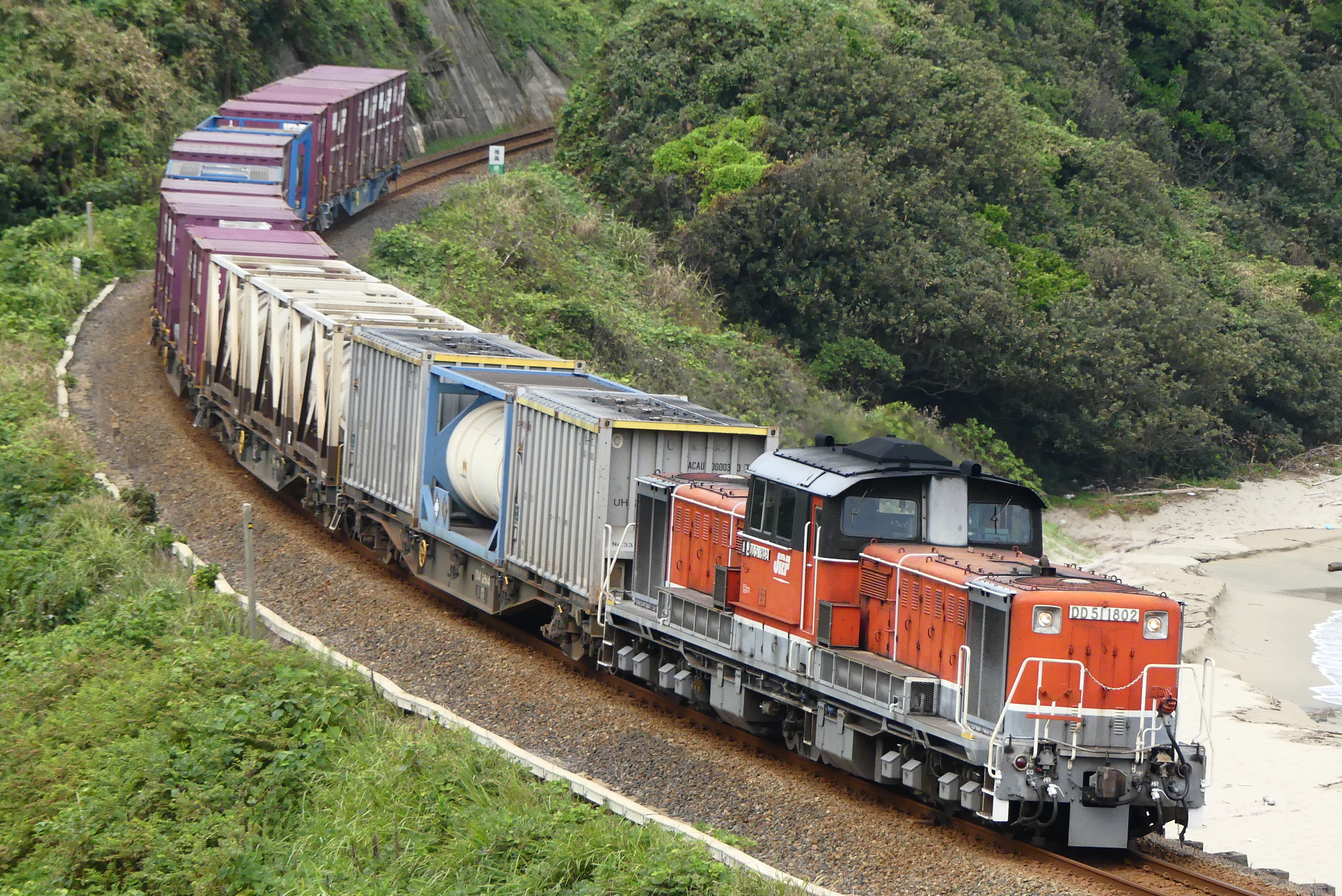 DD51形貨物列車(山陰本線)